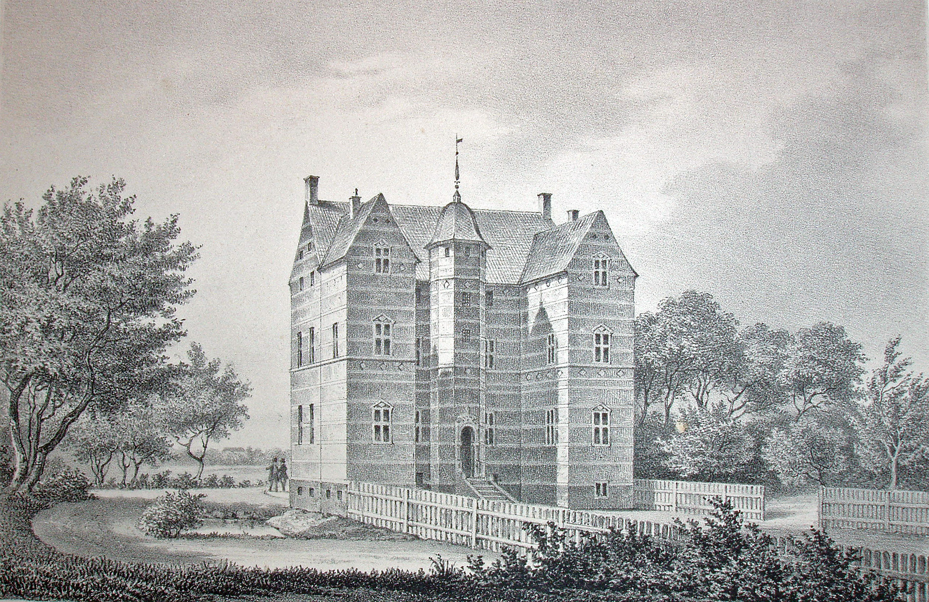 Lystrup er en herregård, der ligger 2 km vest for Faxe i Kongsted Sogn, Faxe Kommune. Slottet er opført 1579 af rigskansler Eiler Grubbe i nederlandsk renæssancestil. På herregården findes bl.a. nogle billedskærerarbejder af billedskæreren Abel Schrøder fra Næstved.